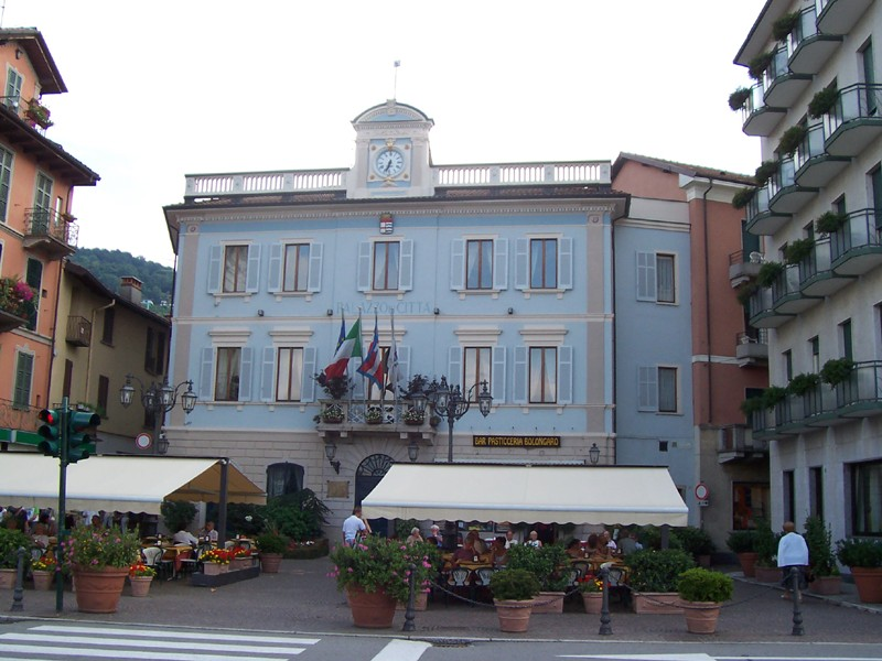 Stresa - Municipio